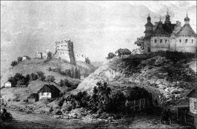 Беларуская (тарашкевіца): Напалеон Орда. Мал. ХІХ ст. в.Суткаўцы (Украіна)